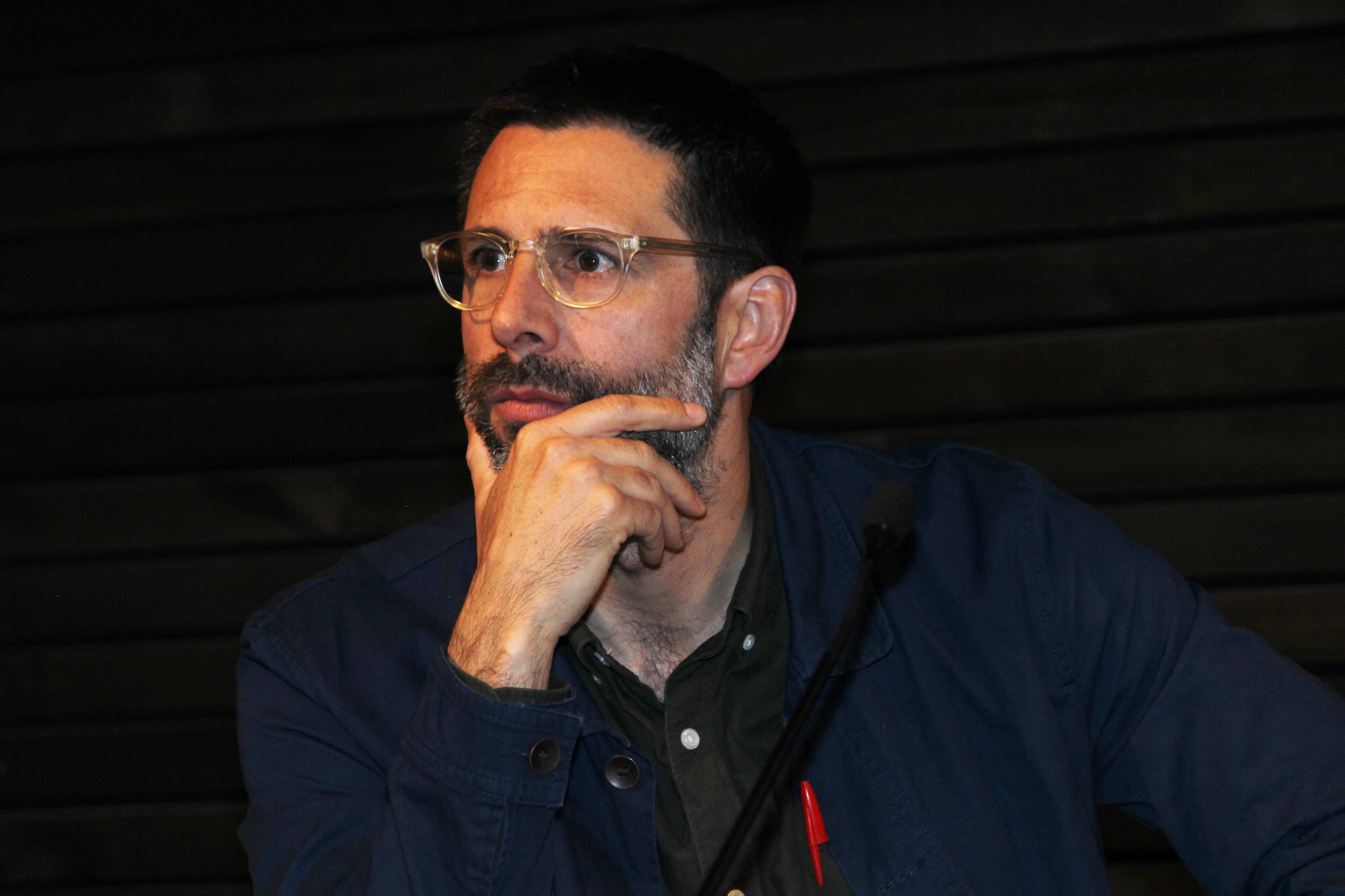 El historiador Manuel Vicuña, decano de la Facultad de Ciencias Sociales e Historia de la Universidad Diego Portales, durante la conferencia «El individualismo en la época hipermoderna» presentada por el filósofo francés Gilles Lipovetsky. Auditorio de la Biblioteca Nicanor Parra (UDP) el 9.11.2018.